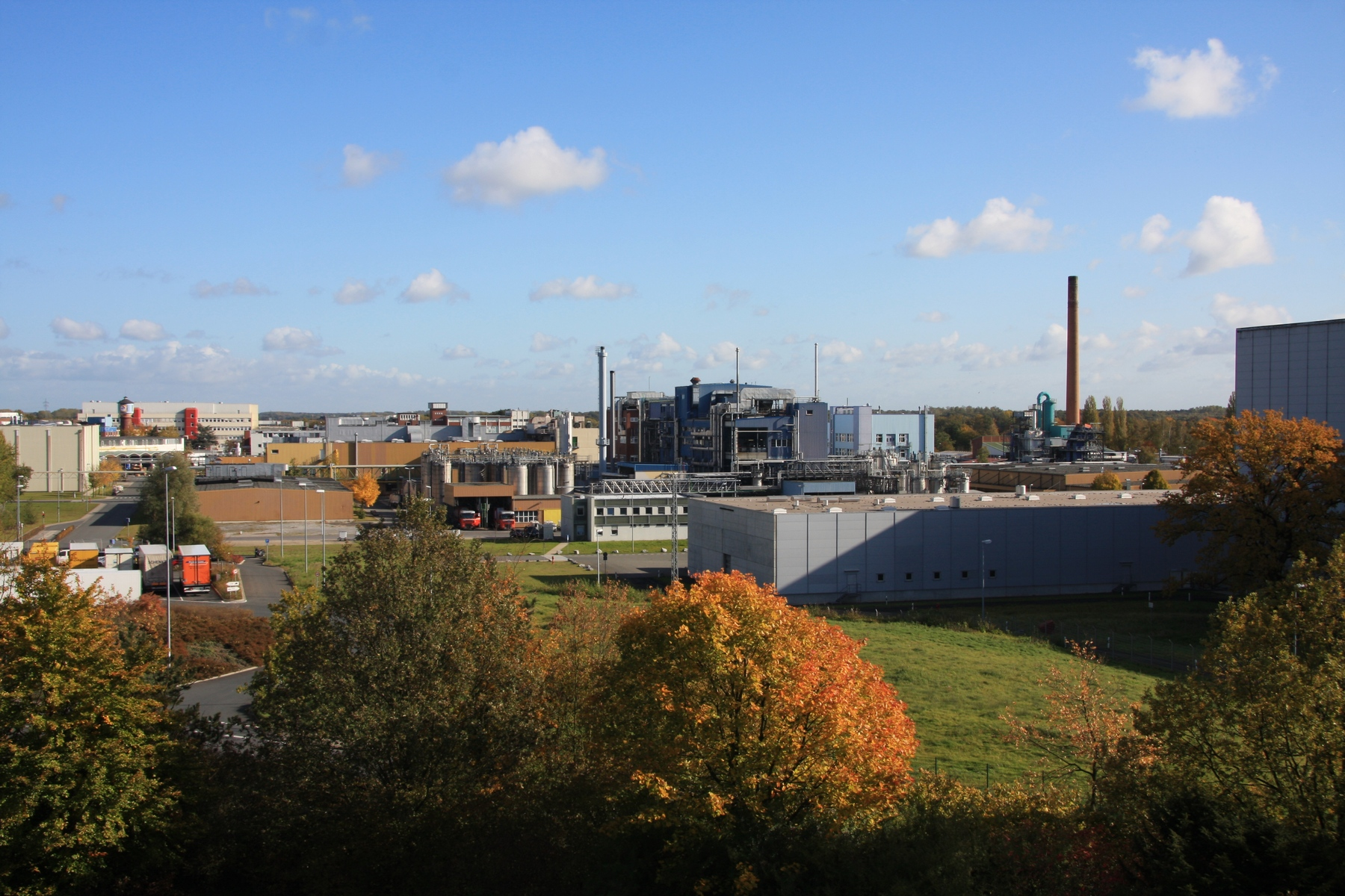 BASF Coatings GmbH mit Sitz in Münster-Hiltrup